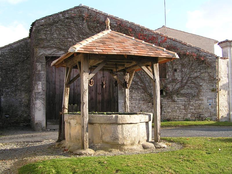 un puits à Ballans en Charente-Maritime